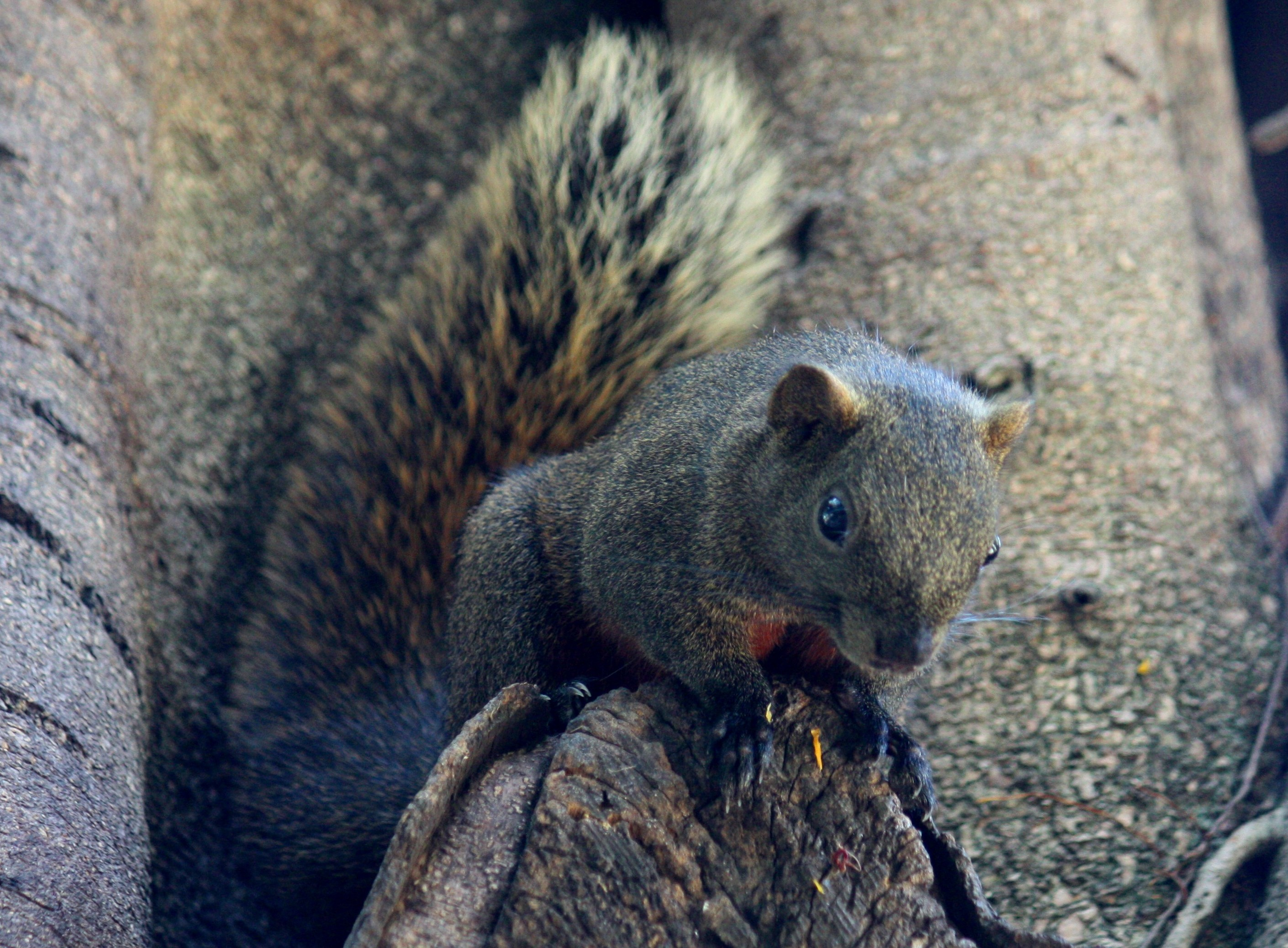 Pallashörnchen in Taipeh.